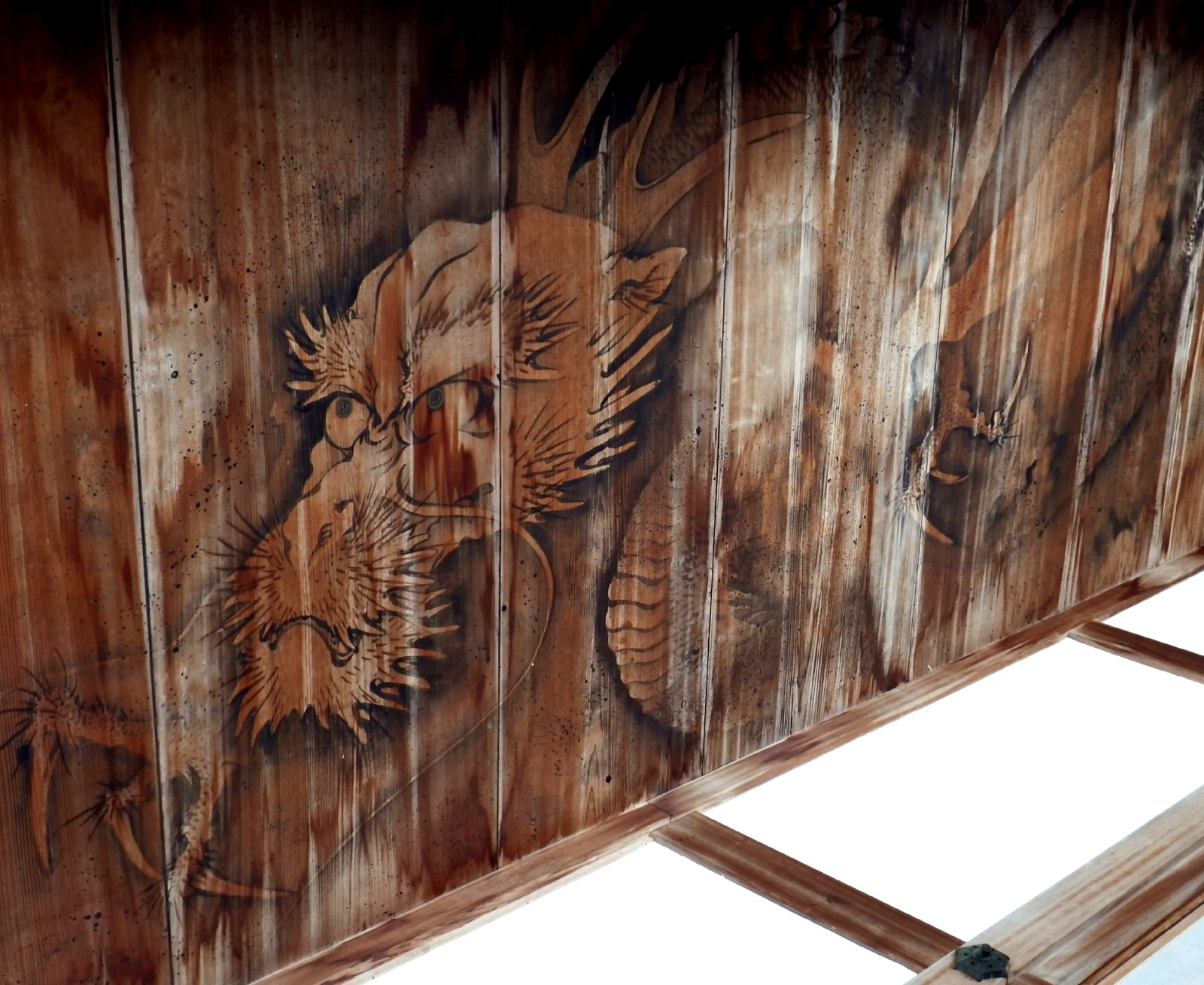 太龍寺の天井絵